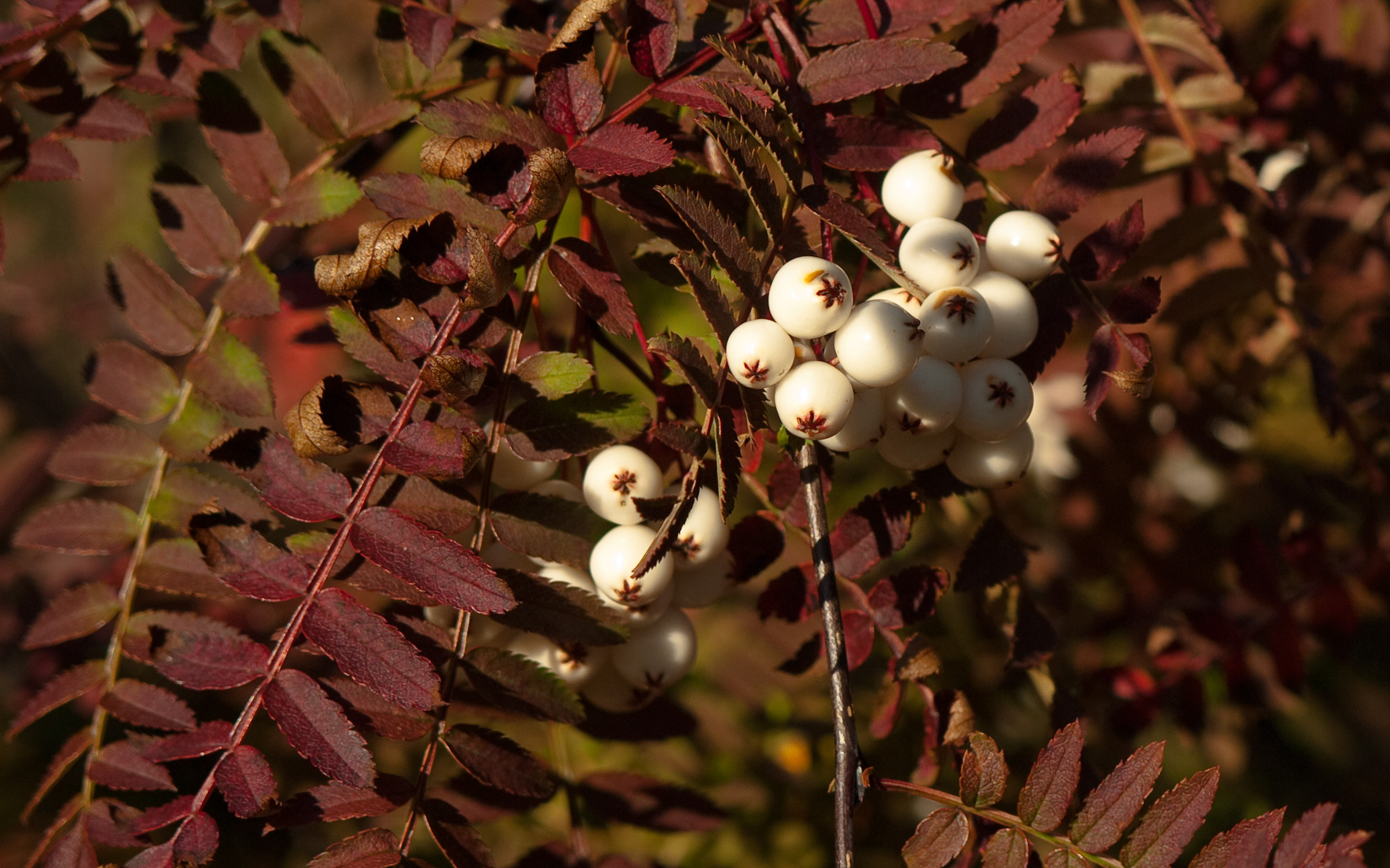 Sorbus frutescens